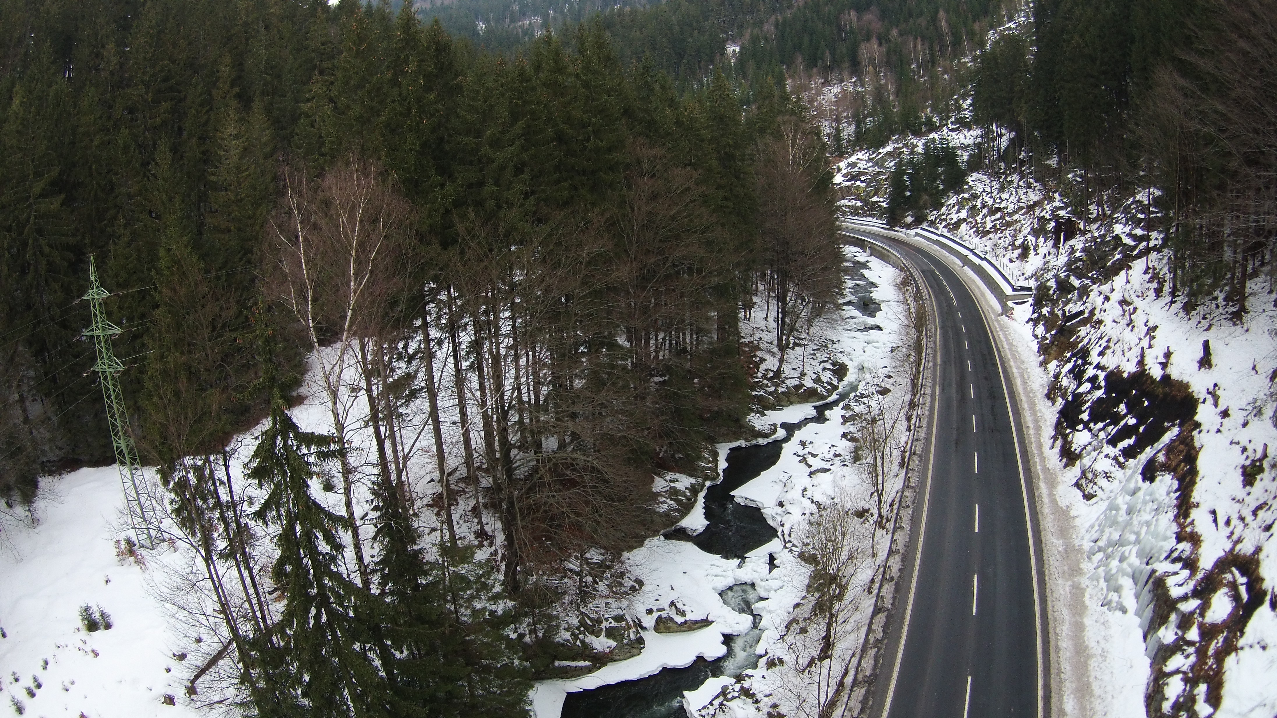 Přírodní památka Labská soutěska. Česká republika.